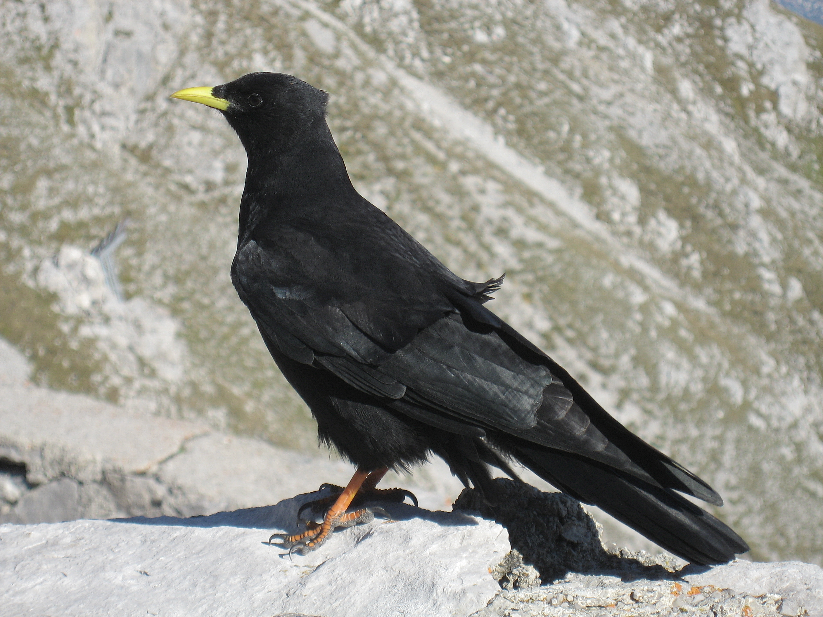 Österreich, Innsbruck, Alpendohle (pyrrhocorax graculus), Hafelekar